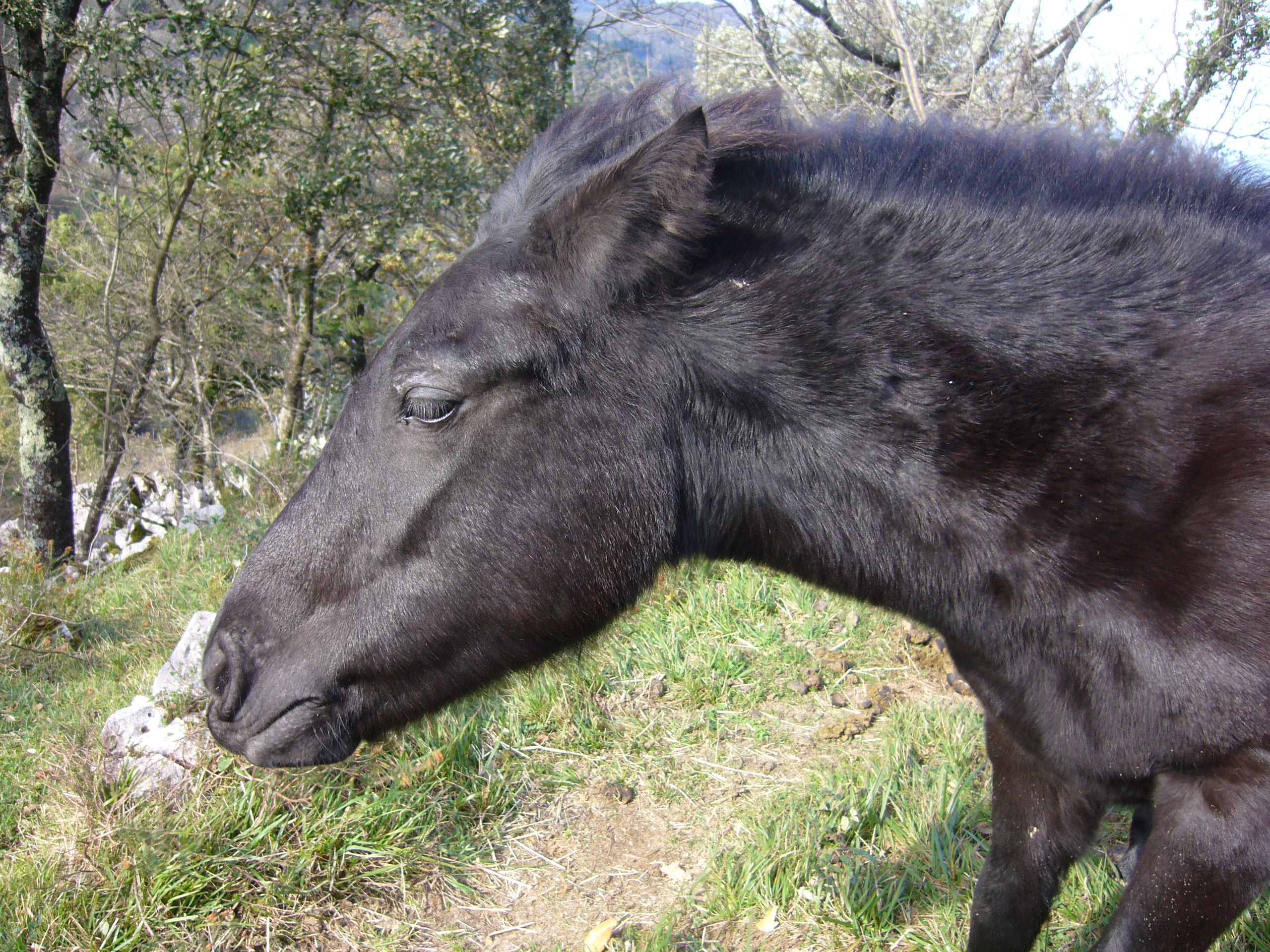 Pottoka behar gazte baten burua